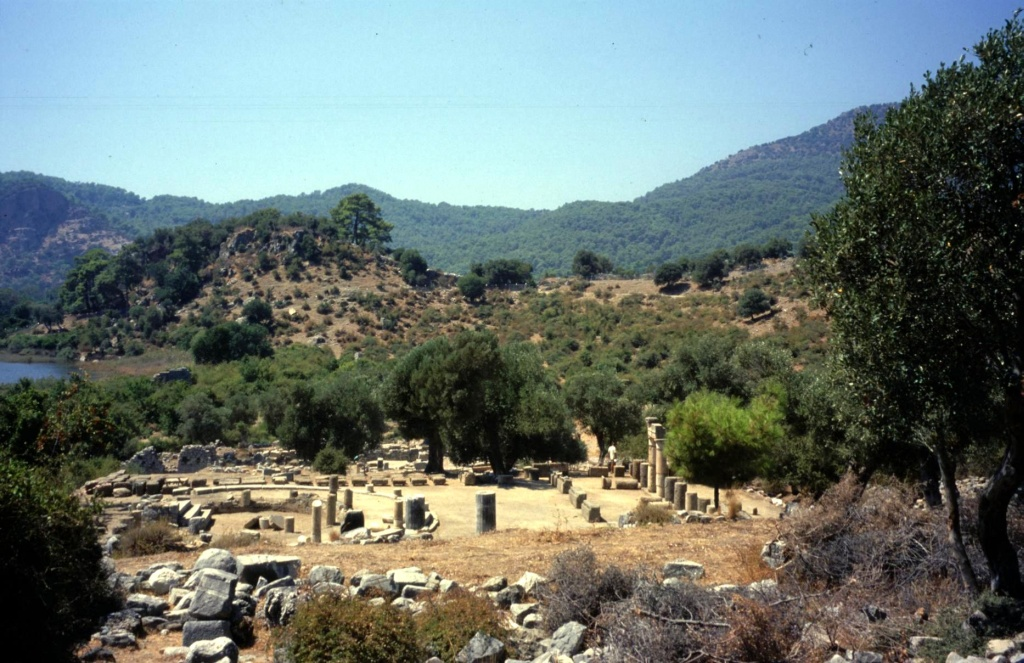 Tempelanlage in Caunos, fotografiert am 31.8.2001 Fotograf: Hans-Heinrich Hoffmann